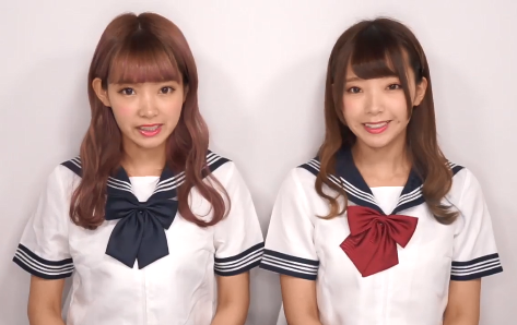 mimmamです。